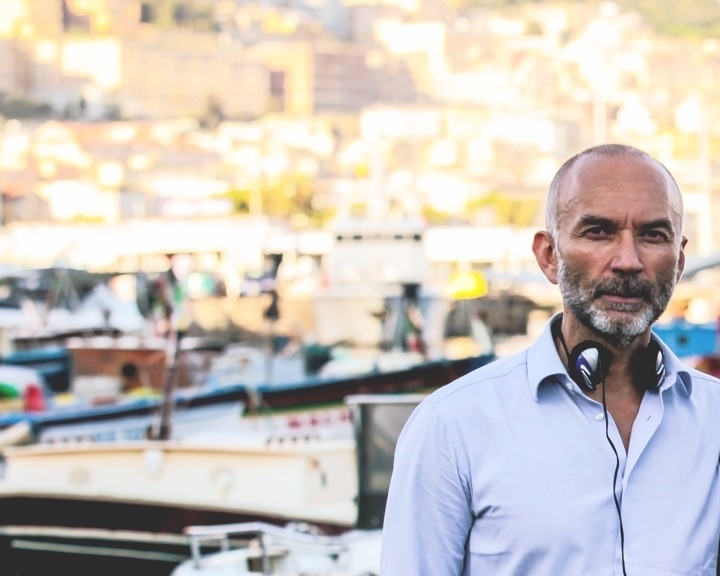 Foto del Regista Massimo Cappelli